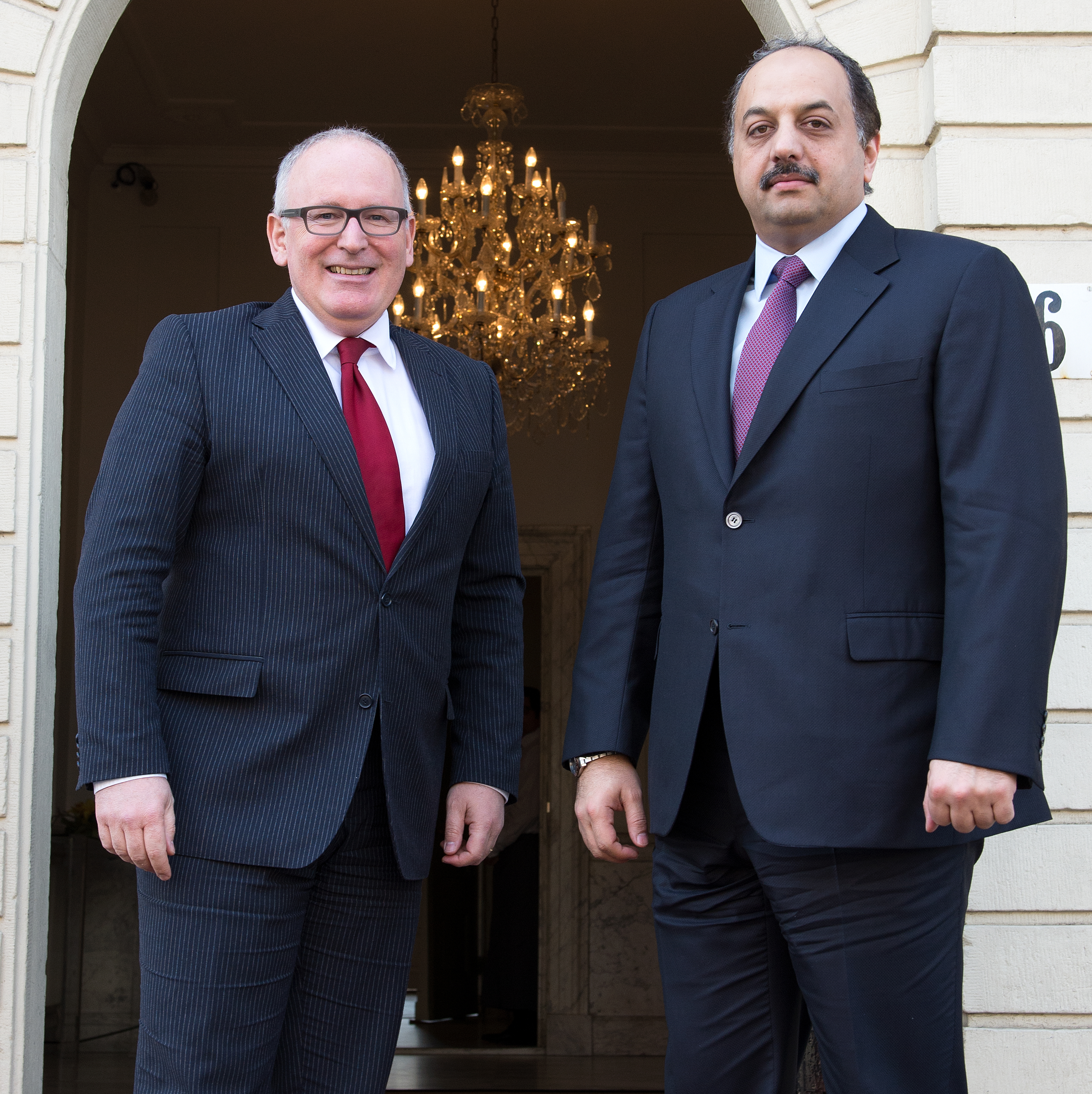 De minister van Buitenlandse Zaken van Qatar, Khalid bin Mohammed Al Attiyah, bezoekt minister Timmermans in het Johan de Witt Huis in Den Haag.